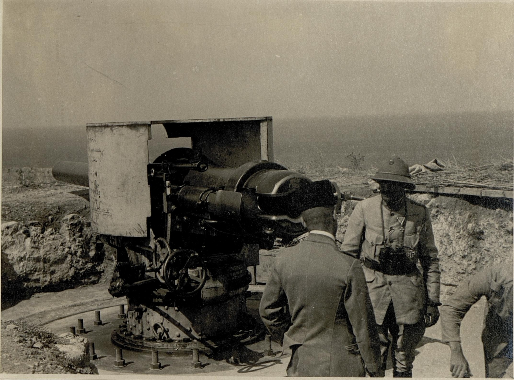 15 cm.lg.40 Küstenkanone b.Yenishebir.